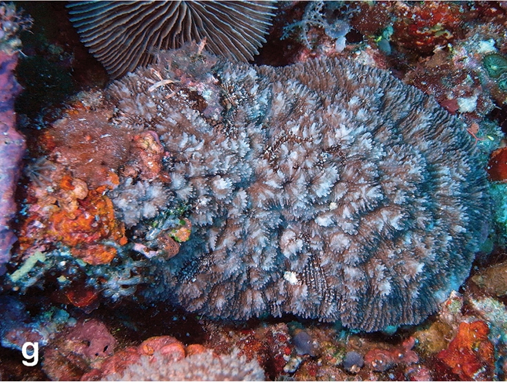 Sandalolitha dentata en Pulau Layang-Layang, islas Spratly, 2013.